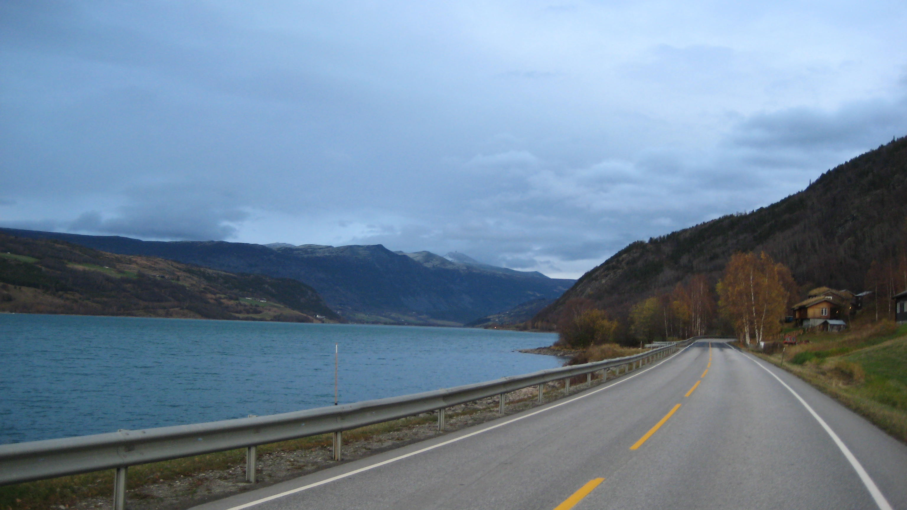 Vågåvatnet sett mot øst.